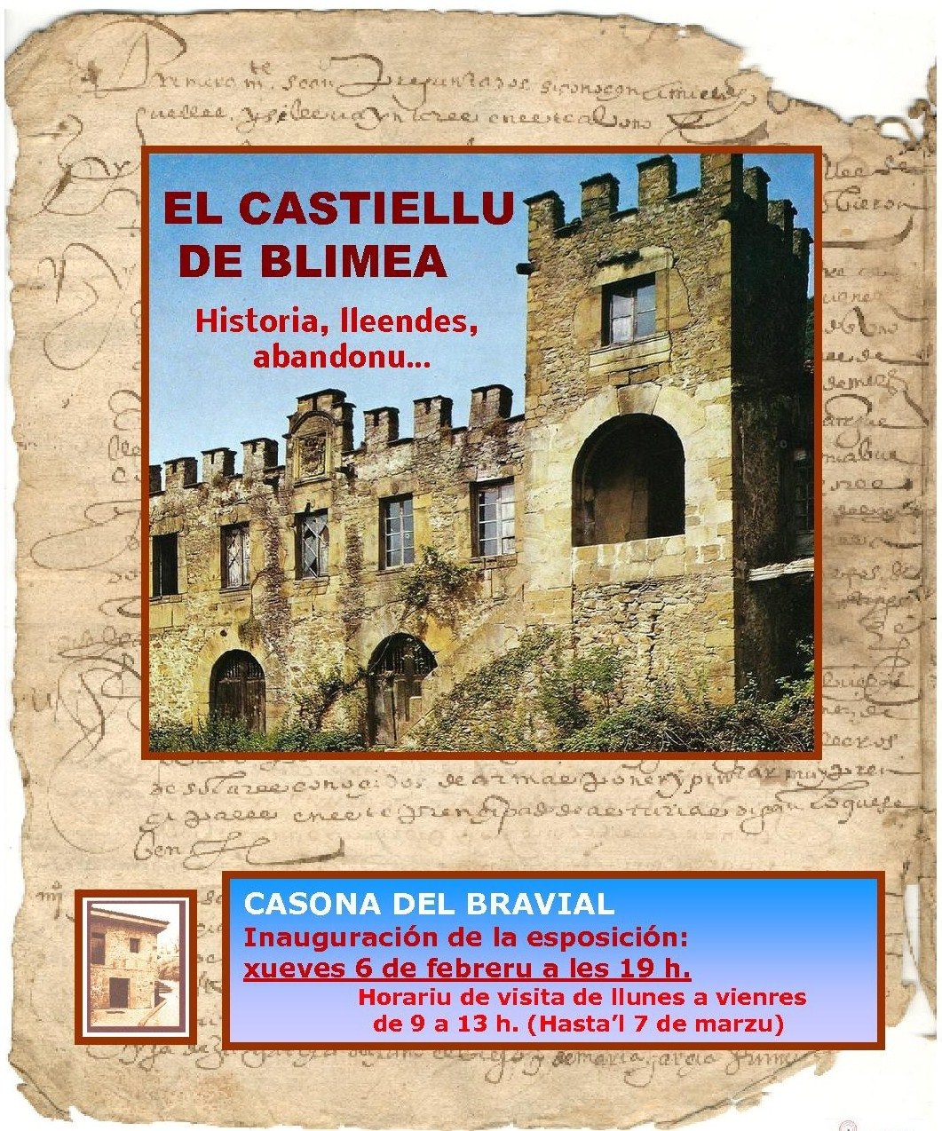 Esposición sobre'l Castiellu de Blimea